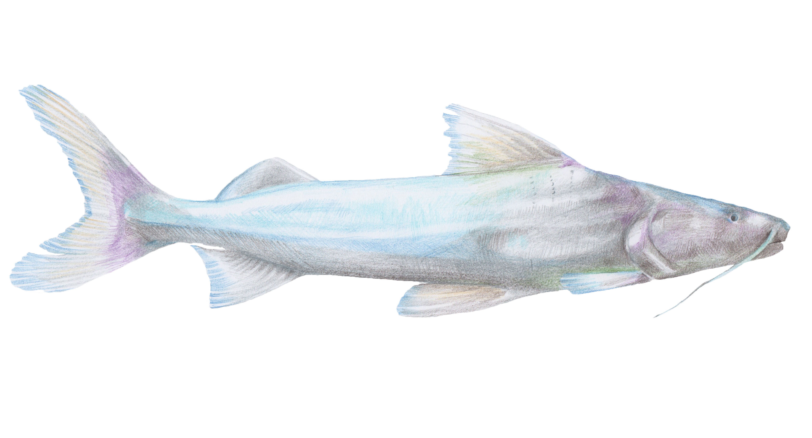 Desenho à lápis do peixe Brachyplatystoma flavicans. Desenho originalmente comissionado pela ONG Rare Brazil (